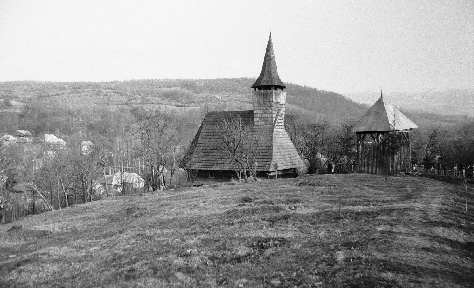 Biserica din Sârbi Susani, drumul vechi (dreapta, prim plan), clopotniţa şi biserica. Foto: Alexandru Baboş, aprilie 1995.